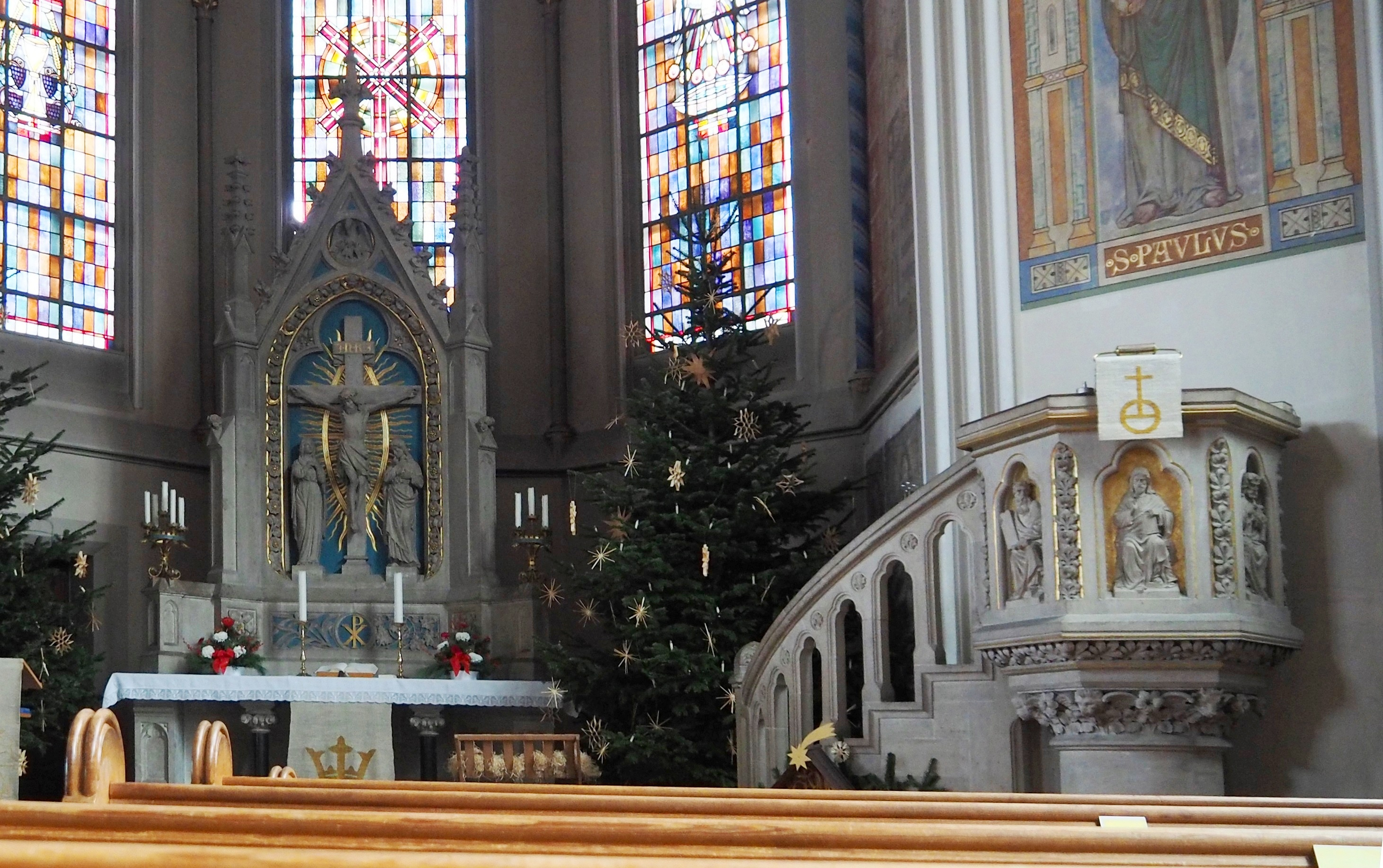 Bad harzburg, Lutherkirche, Altar und Kanzel von Wilhelm Sagebiel